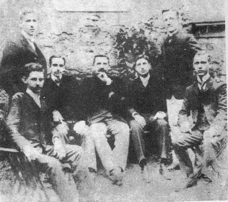 America Football Club, Rio de Janeiro, Brazil. The founders/os fundadores: Standing/em pé: Alberto Klotzbücher, Oswaldo Mohrstedt; sitting from left/sentado da esquerda: Henrique Mohrstedt , Gustavo Bruno Mohrstedt , Alfredo Mohrstedt , Jaime Faria Machado e Alfredo Guilherme Koehler.